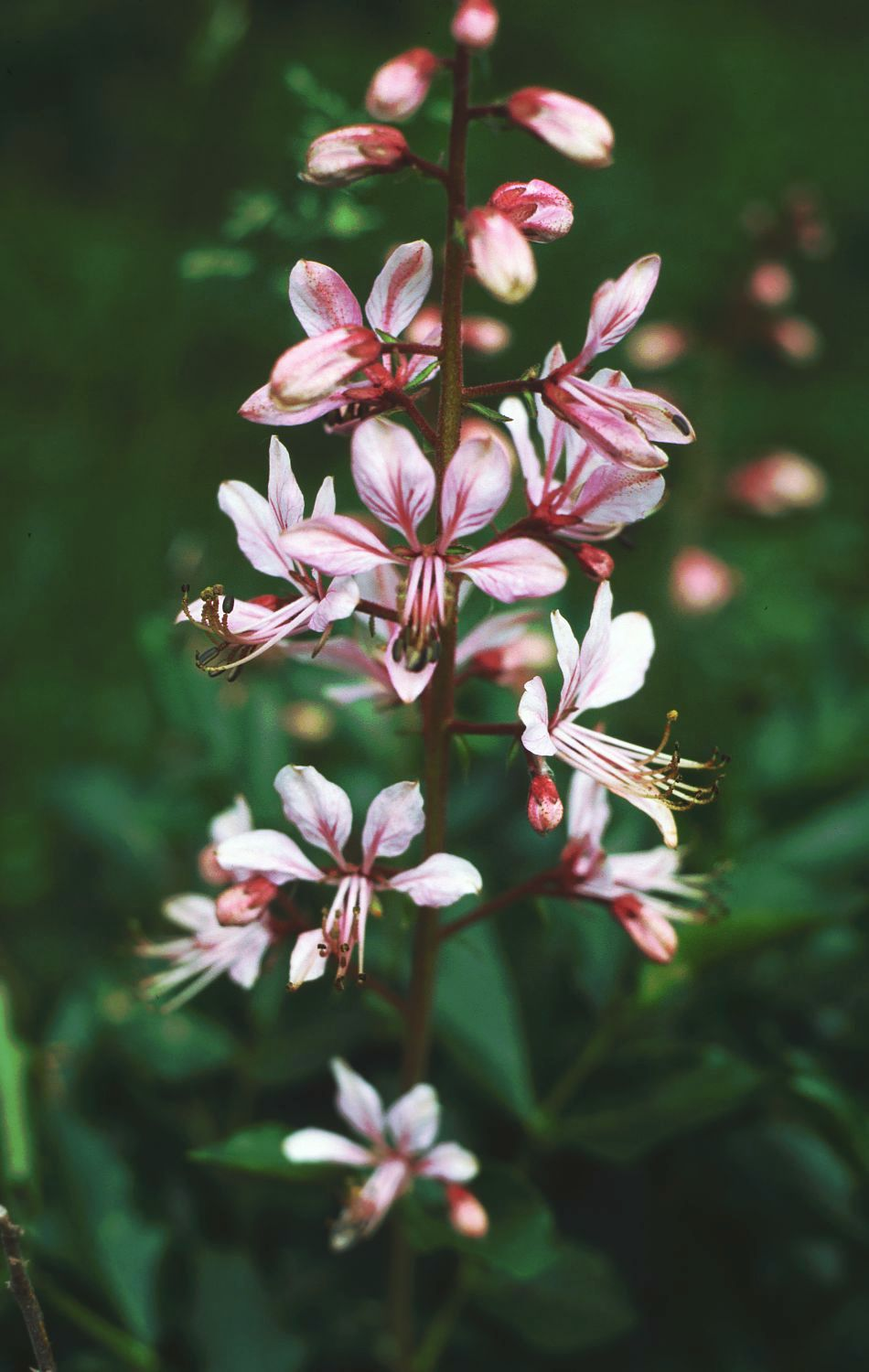 Diptam (Dictamnus albus), Rautengewächse (Rutaceae) - Tschechien/Česká republika/Czech Republic: Jihomoravský kraj, Okres Znojmo, Thayatal/Podyjí Sealsfieldův kámen NW Popice